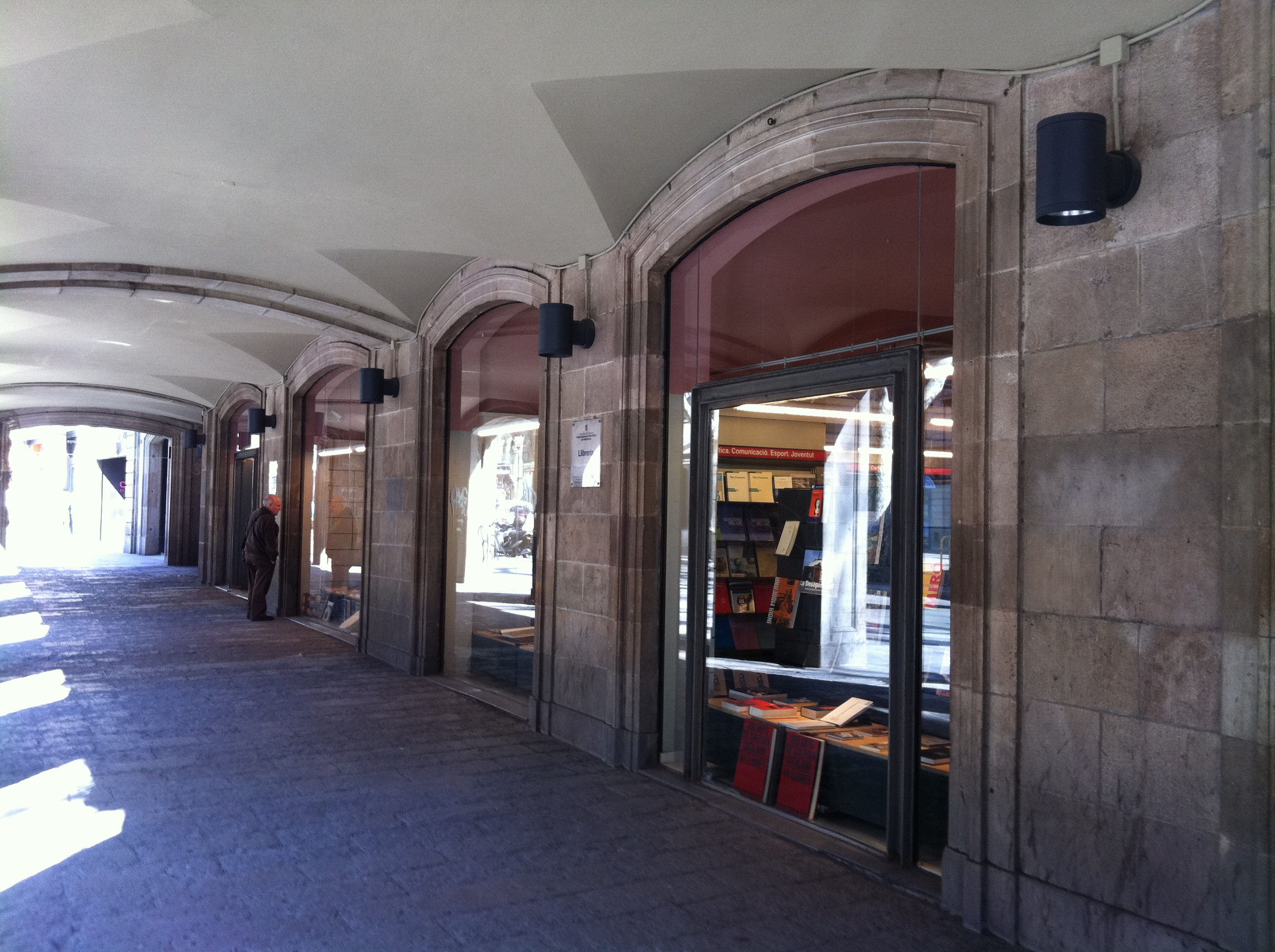 Llibreria de la Generalitat de Catalunya als baixos del Palau Moja